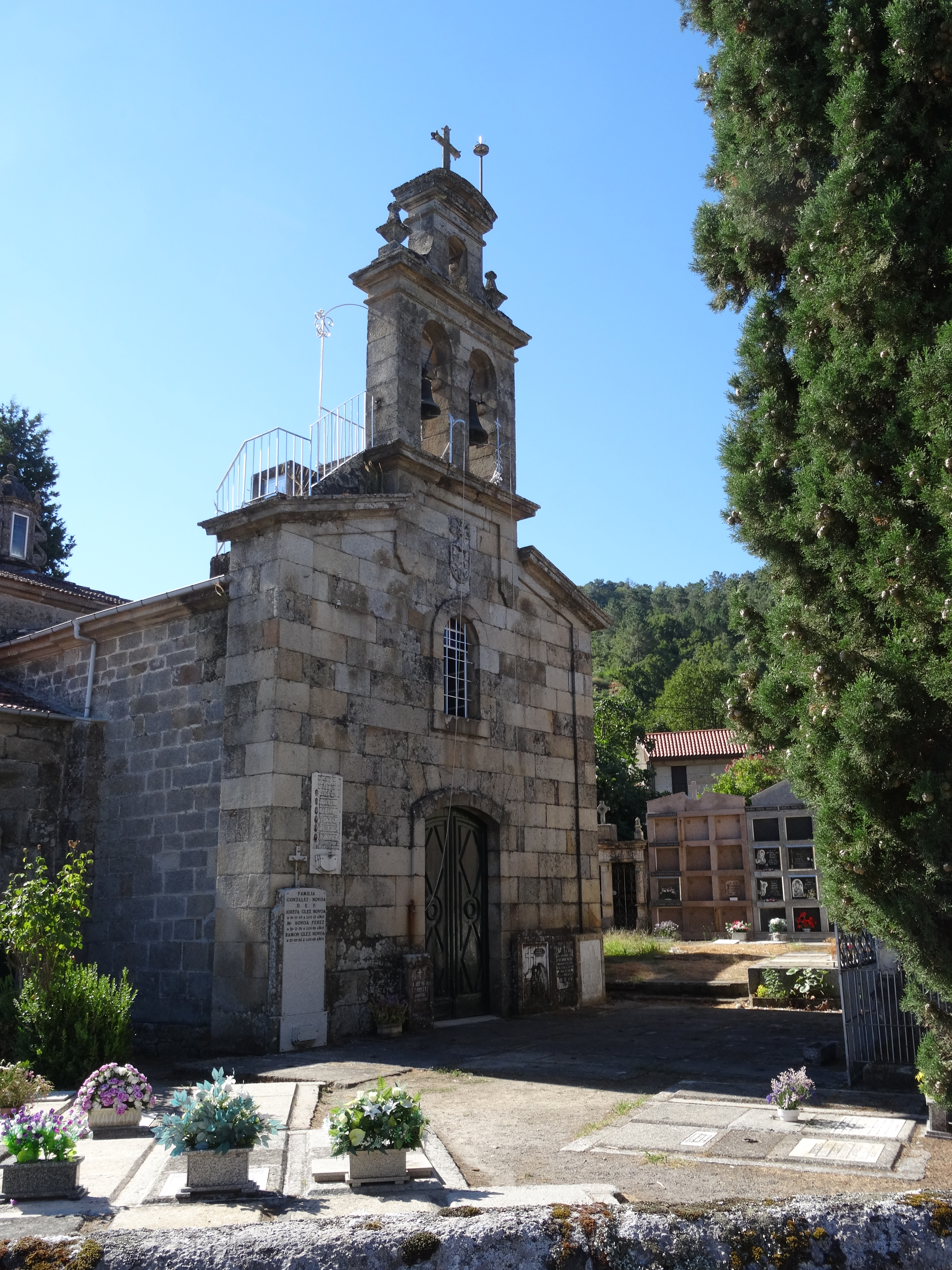 Ver título.